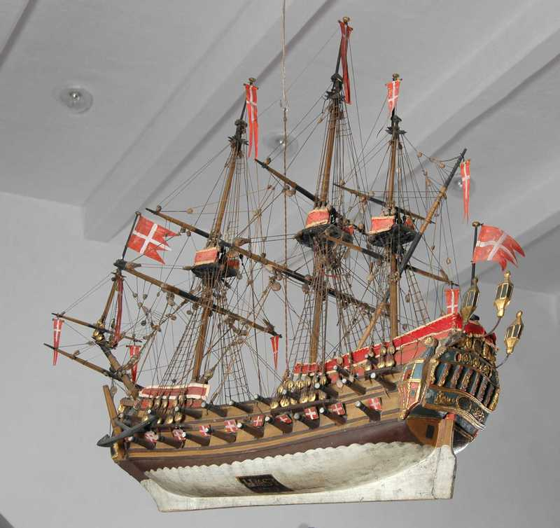 Kirkeskip fra 1725 til minne om skipper Halvor Aasuldsen Tverdal (1681-1725). Hans hustru Susanna Ellingsdatter Eidbo bekostet fregatten som bærer navnet Susan 1725. Brukssted: Aust-Agder, Arendal. Inngår også i utstillingen "1814 – Spillet om Danmark og Norge" ved Norsk Folkemuseum 14. jan 2014 — 31. jul 2014.